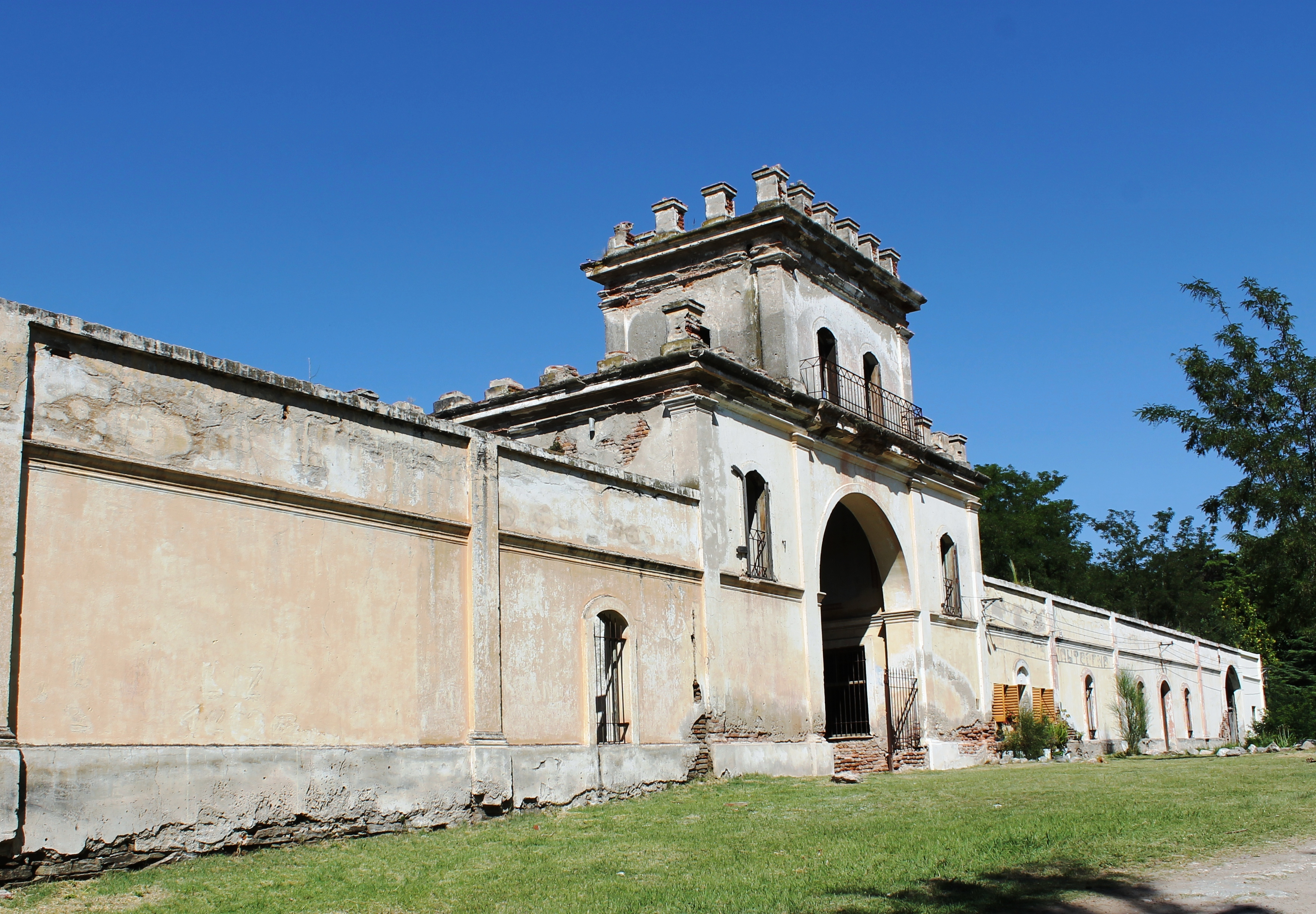 Casco de estancia construido alrededor de 1850, fue el primer lugar poblado de la zona, propiedad de Carlos Bett, fundador de la localidad de La Toma.